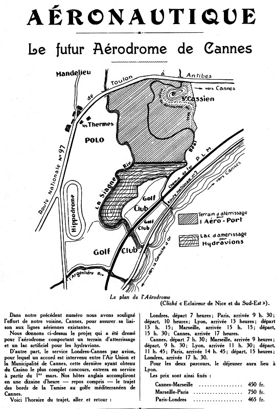 Illustration du projet de l'aéroport de Cannes-Mandelieu